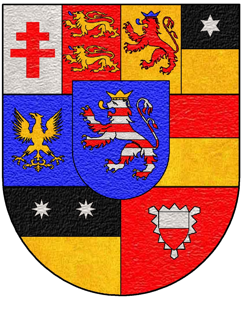 Stemma della famiglia Hessen-Rotenburg Punti dell'arme: 1ª fila: punto 1 - Principato di Hersfeld e Abbazia di Hersfeld; punto 2 - Contea di Dietz; punto 3 - Contea di Katzenelbogen; punto 4 - Contea di Ziegenhain; 2ª fila: punto 5 - Ducato di Ratibor; punto 6 - Abbazia di Corvey; 3ª fila: punto 7 - Contea di Nidda; punto 8 - Contea di Schaumburg; Sul tutto: Langraviato dell'Assia